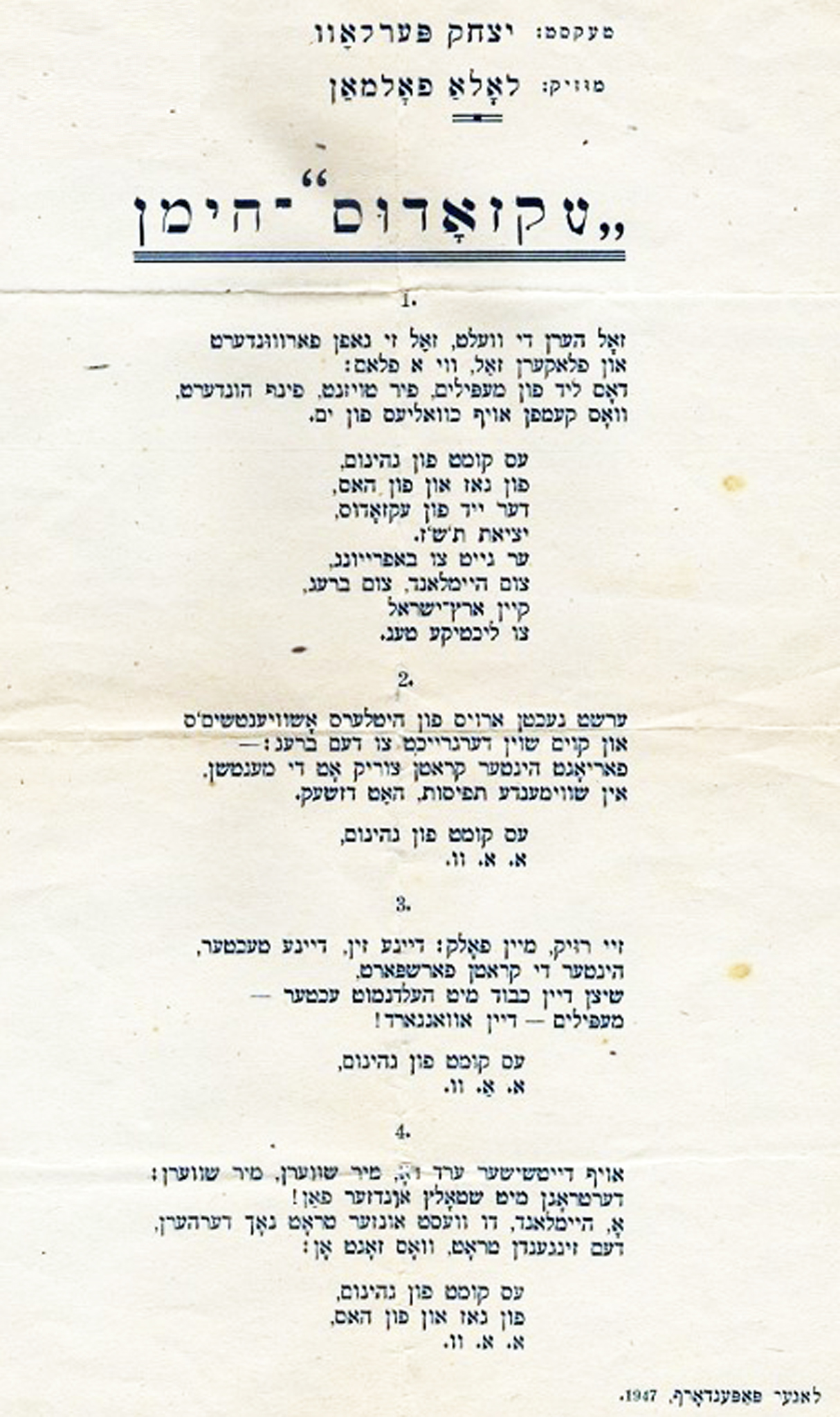 הימנון האקסודוס ביידיש כפי שפורסם במחנה פופנדורף בשנת 1947